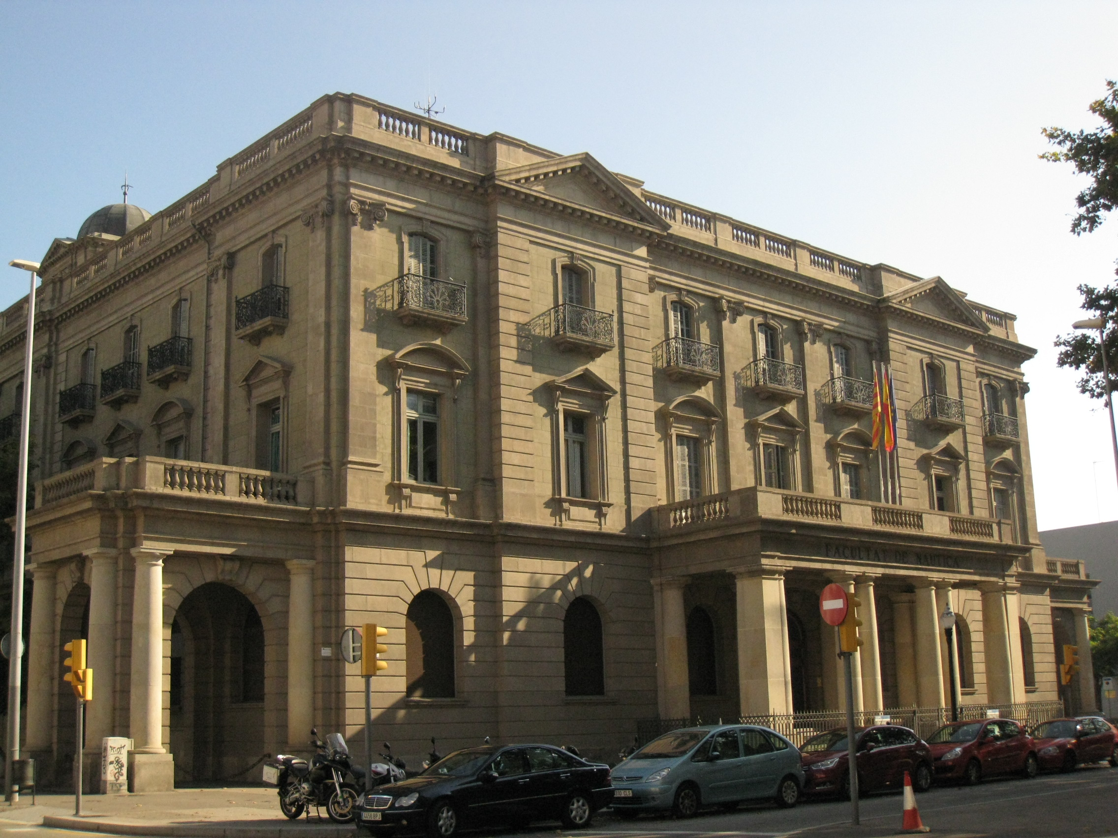 Facultat de Nàutica, edifici de Joaquim Vilaseca i Adolf Florensa (1930-33), a (Barcelona). Façana del Pla de Palau.